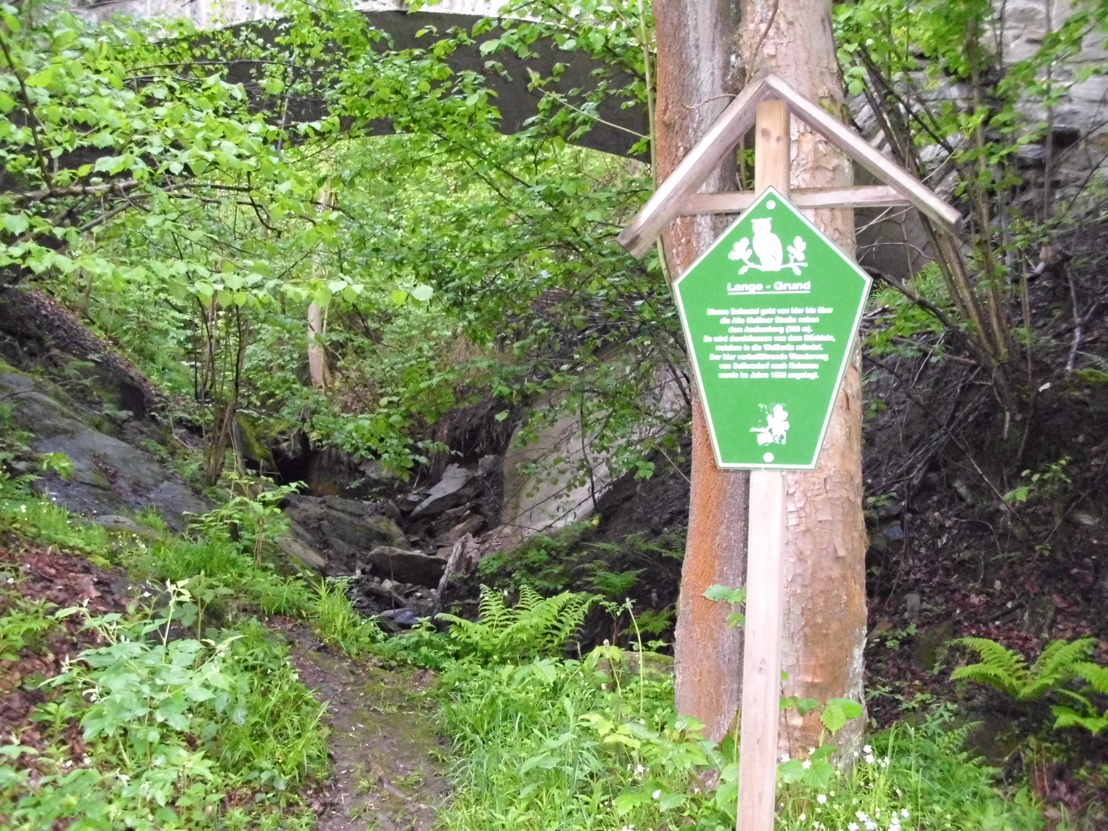 Hier verläuft der Wanderweg an der Weißeritz über den Lange-Grundbach von Seifersdorf nach Spechtritz